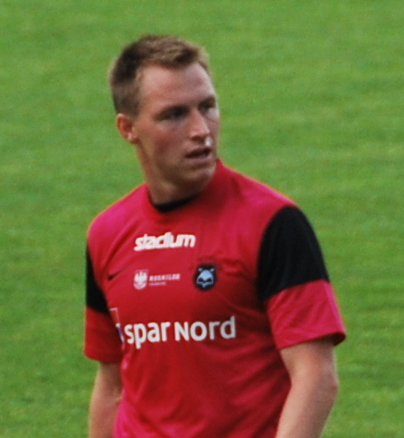 Fodboldspilleren Jesper Håkansson fra FC Roskilde. Her i 1. divisionskampen mod Viborg FF på Viborg Stadion.